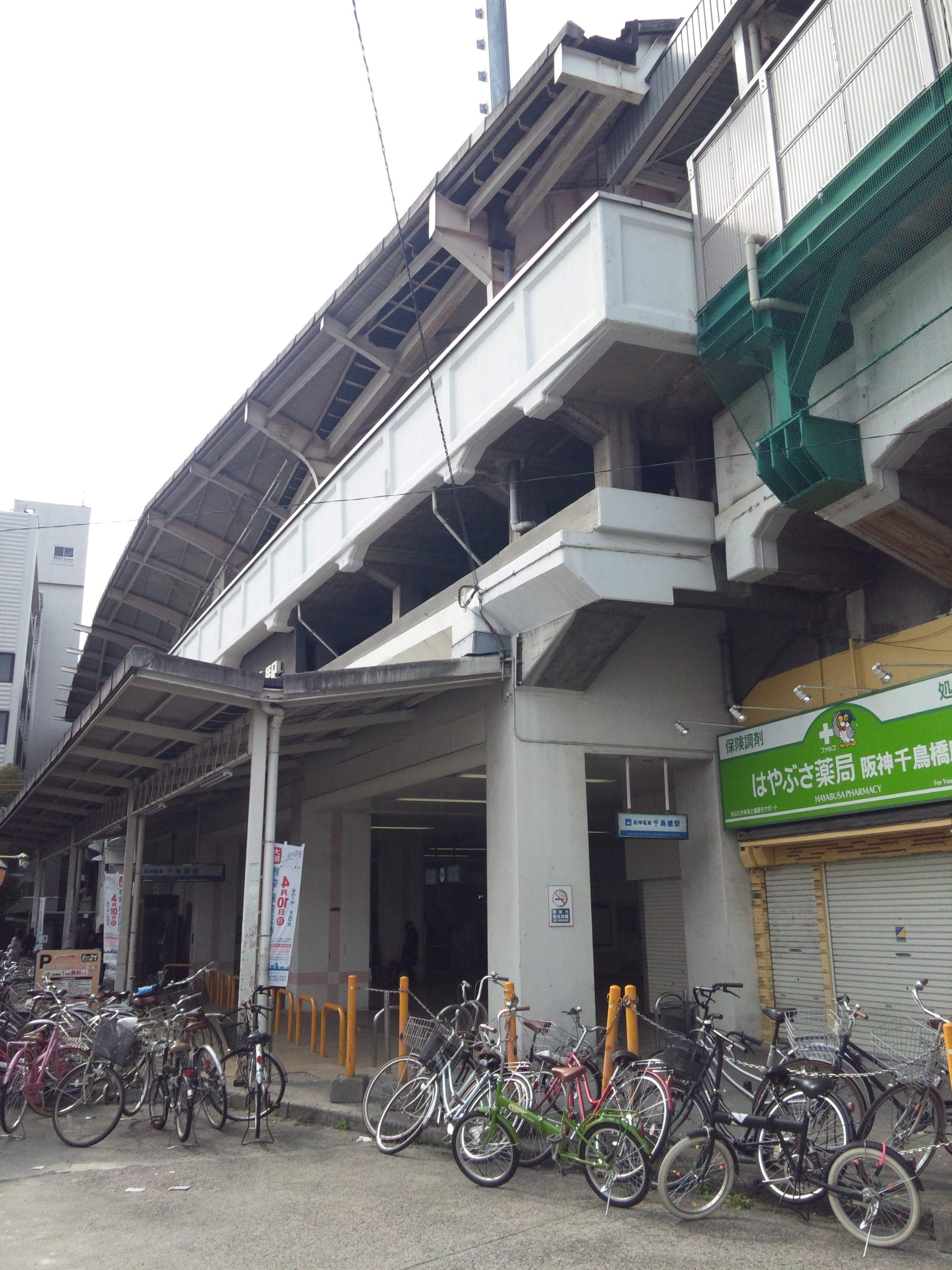 阪神千鳥橋駅